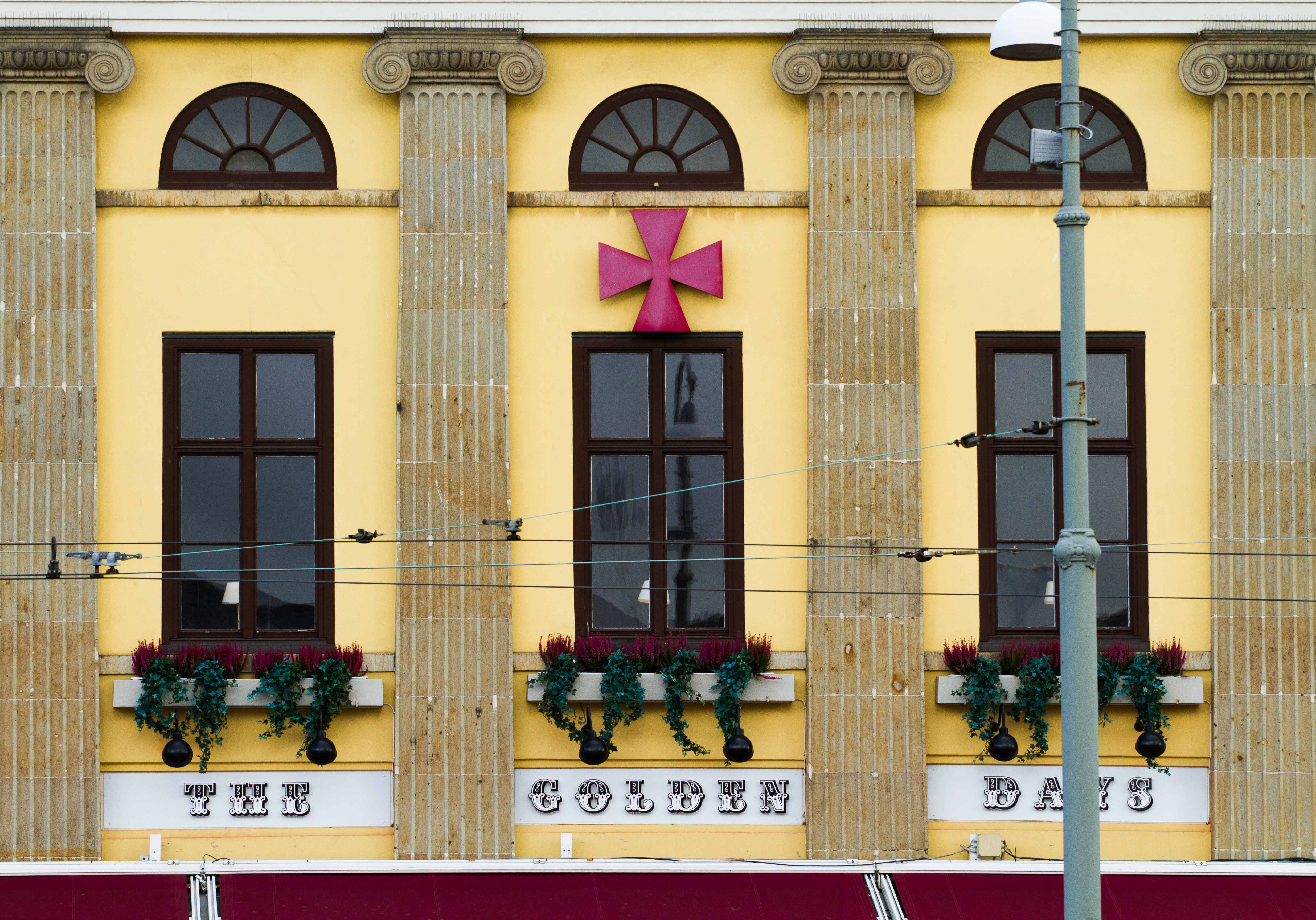 Detaljbild, Frimurarlogen (Inom Vallgraven 15:4 f.d. Frimuraren 4) på Södra Hamngatan 31 i Göteborg.